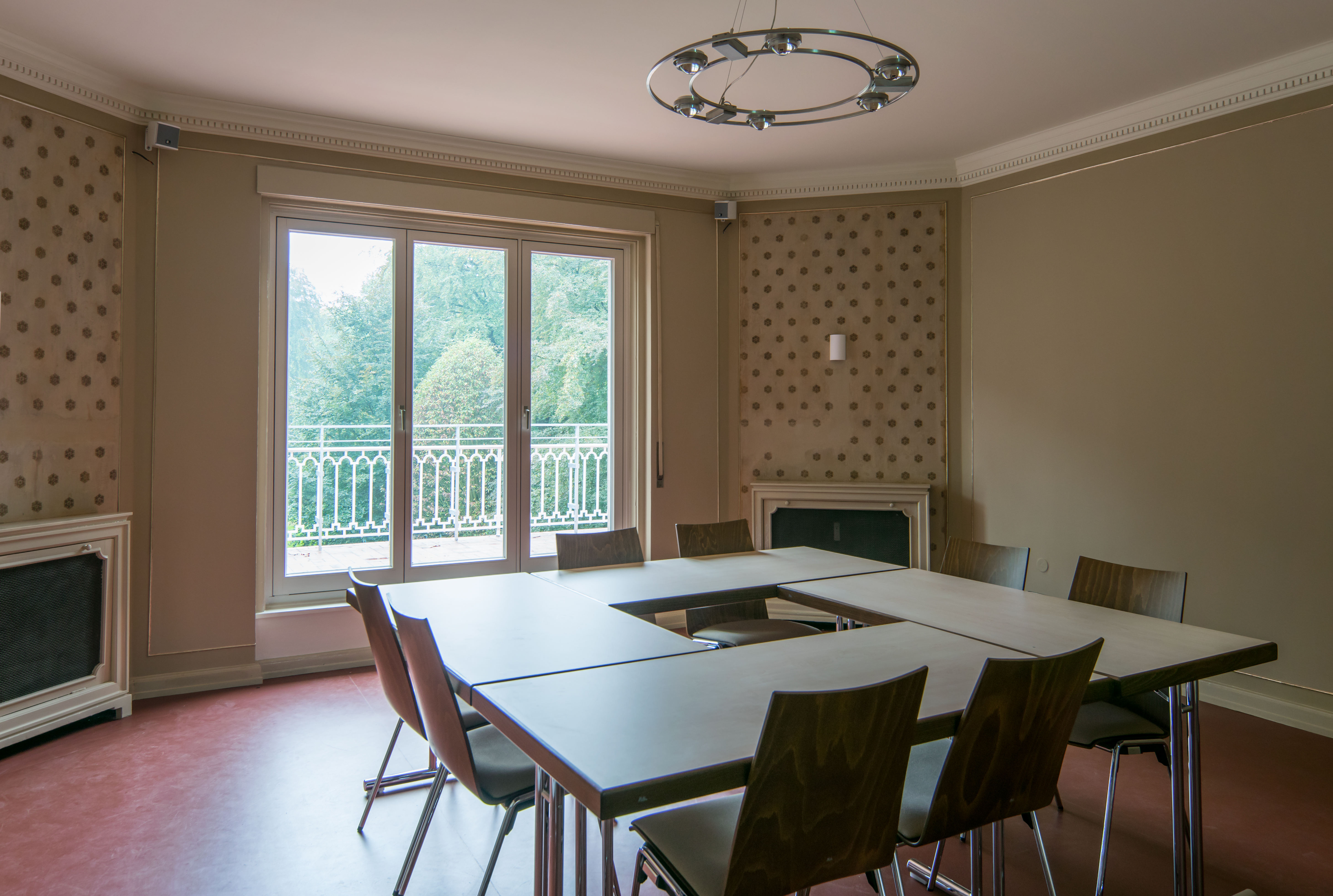 HH-Volksdorf Ohlendorffsche Villa Tapetenzimmer